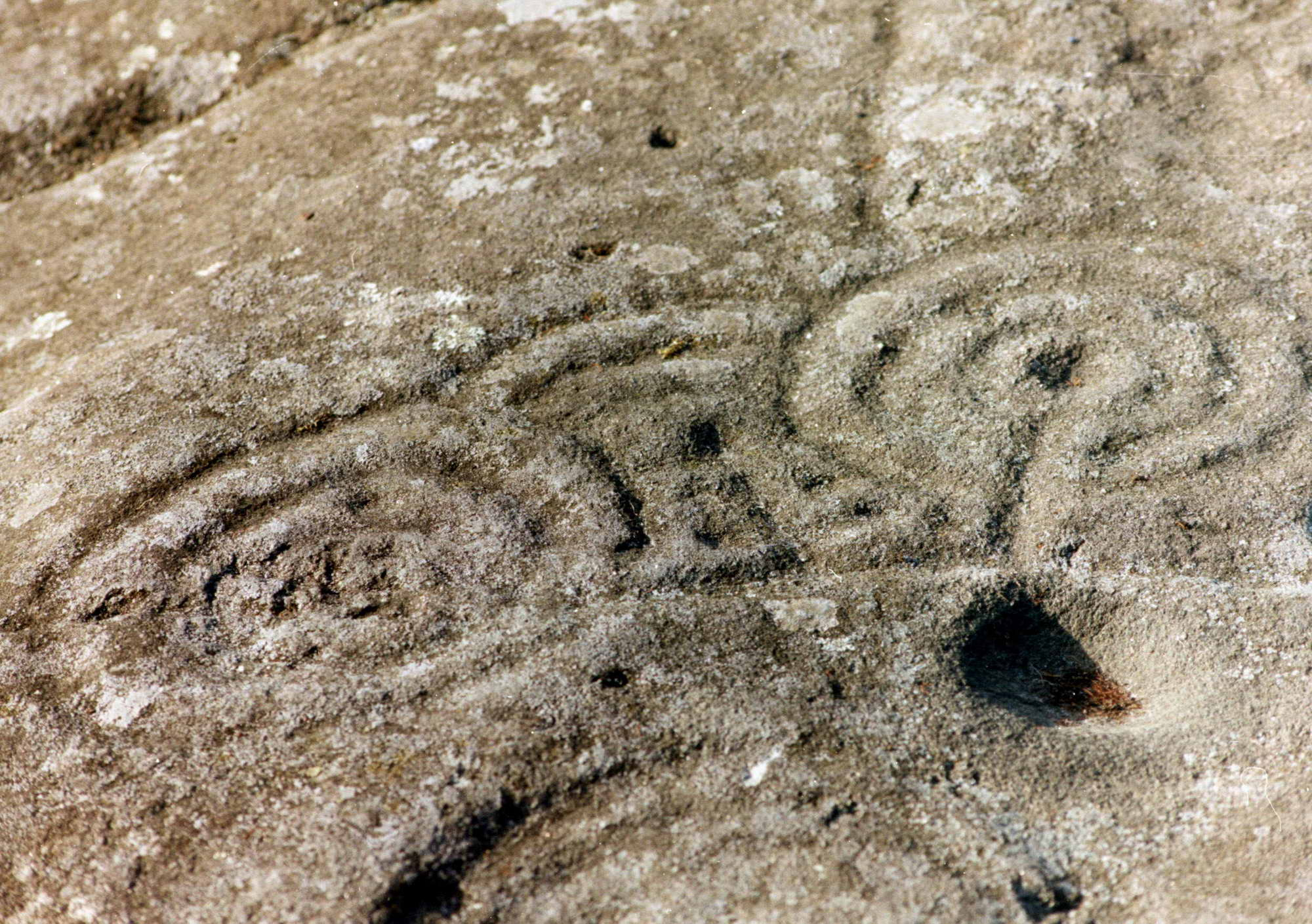 Petroglifos de Mogor (3). Concello de Marín.